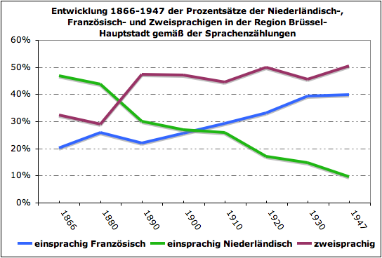 Entwicklung zwischen 1866-1947 der Prozentsätze der Niederländisch-, Französisch- und Zweisprachigen in der Region Brüssel-Hauptstadt gemäß der Sprachenzählungen